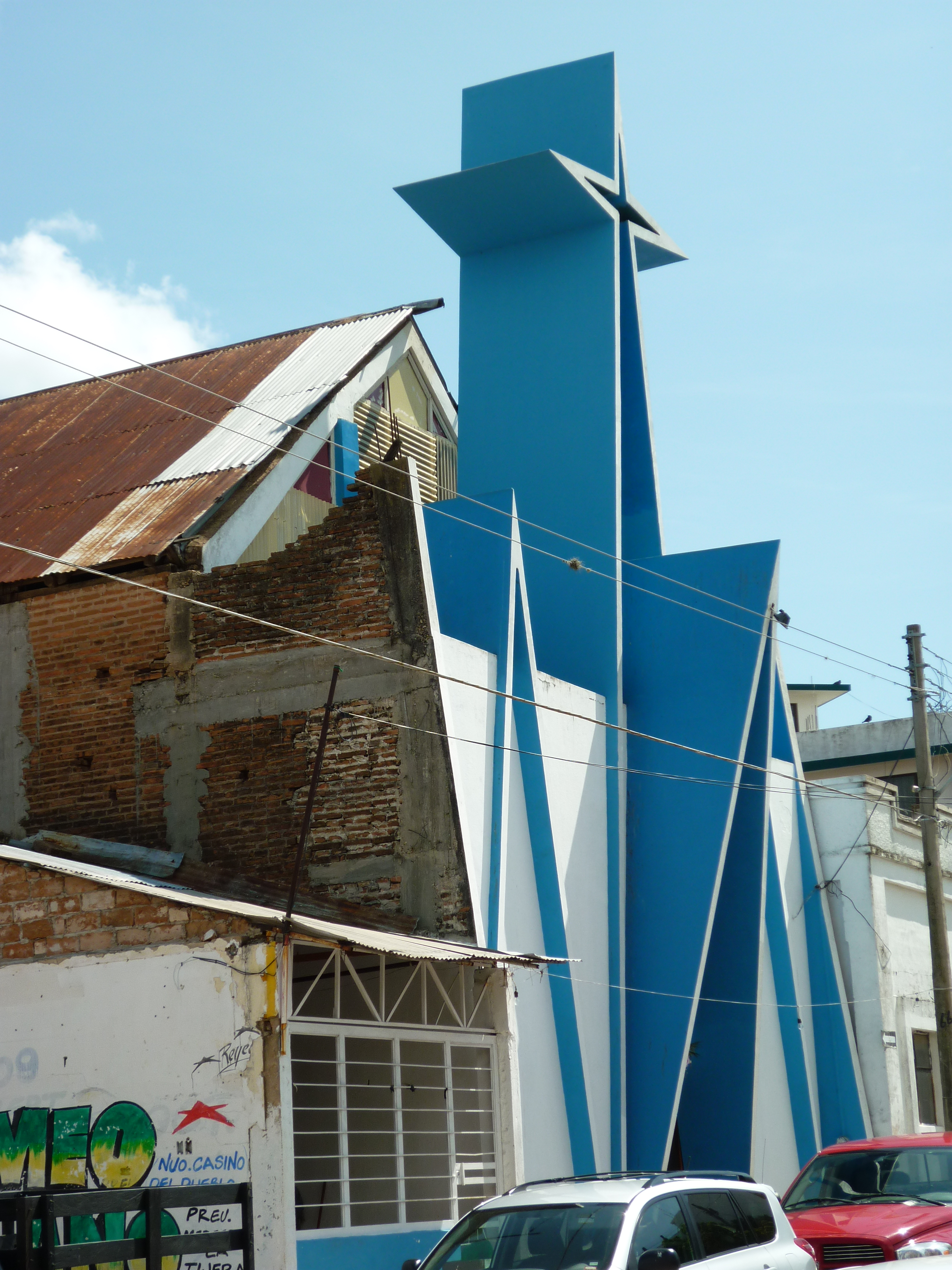 Ciudad de Emiliano Zapata, Tabasco